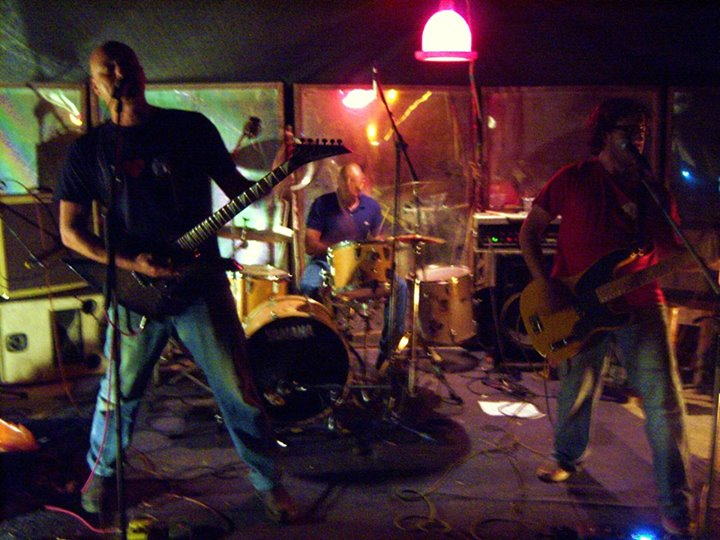 הופעה של השפן הנכון בבולי